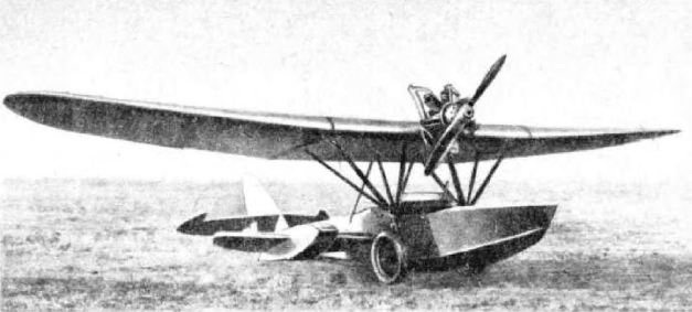 Šavrov Š-1 (1929)